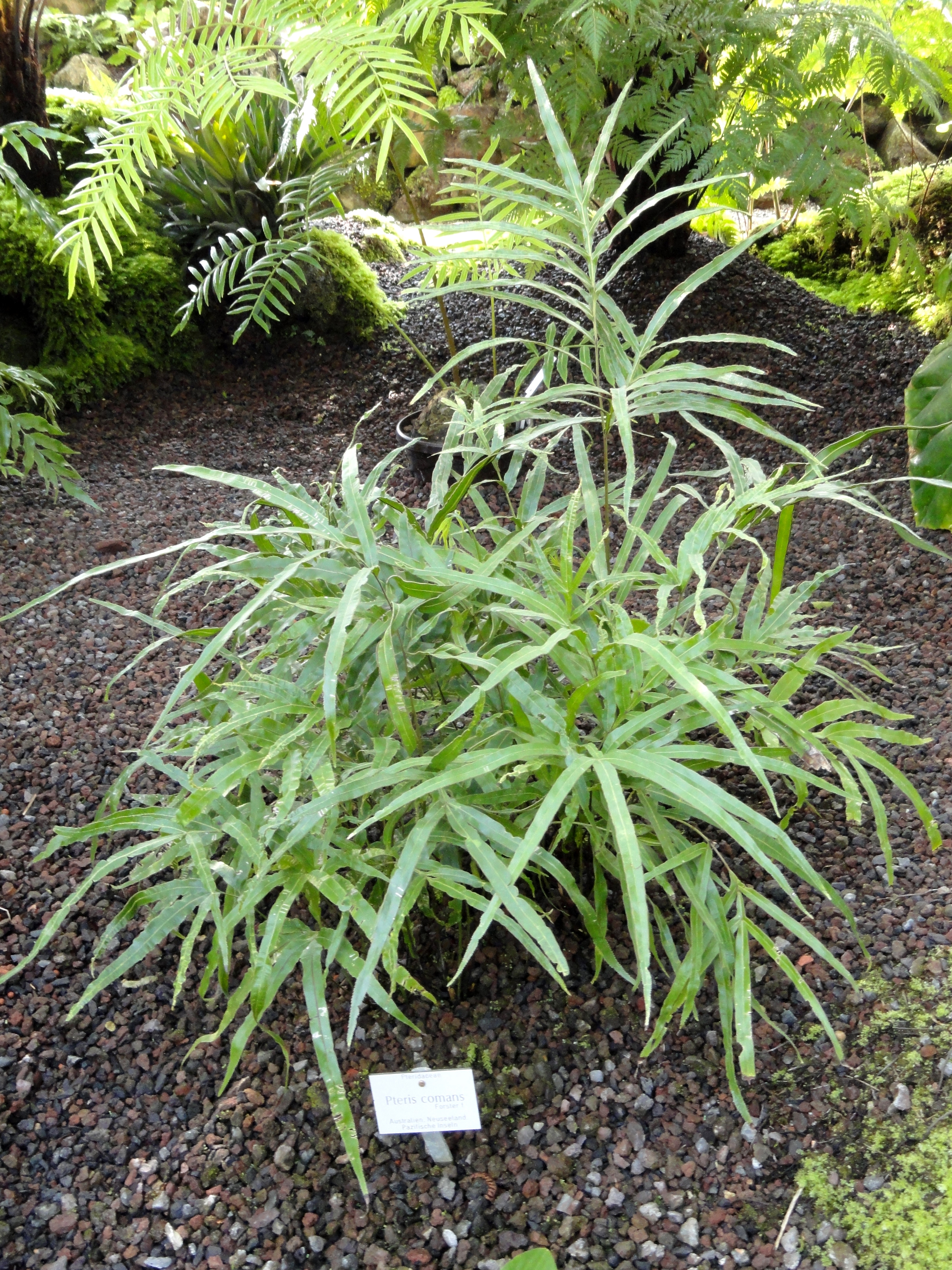 Pteris comans specimen in the Botanischer Garten München-Nymphenburg, Munich, Germany.